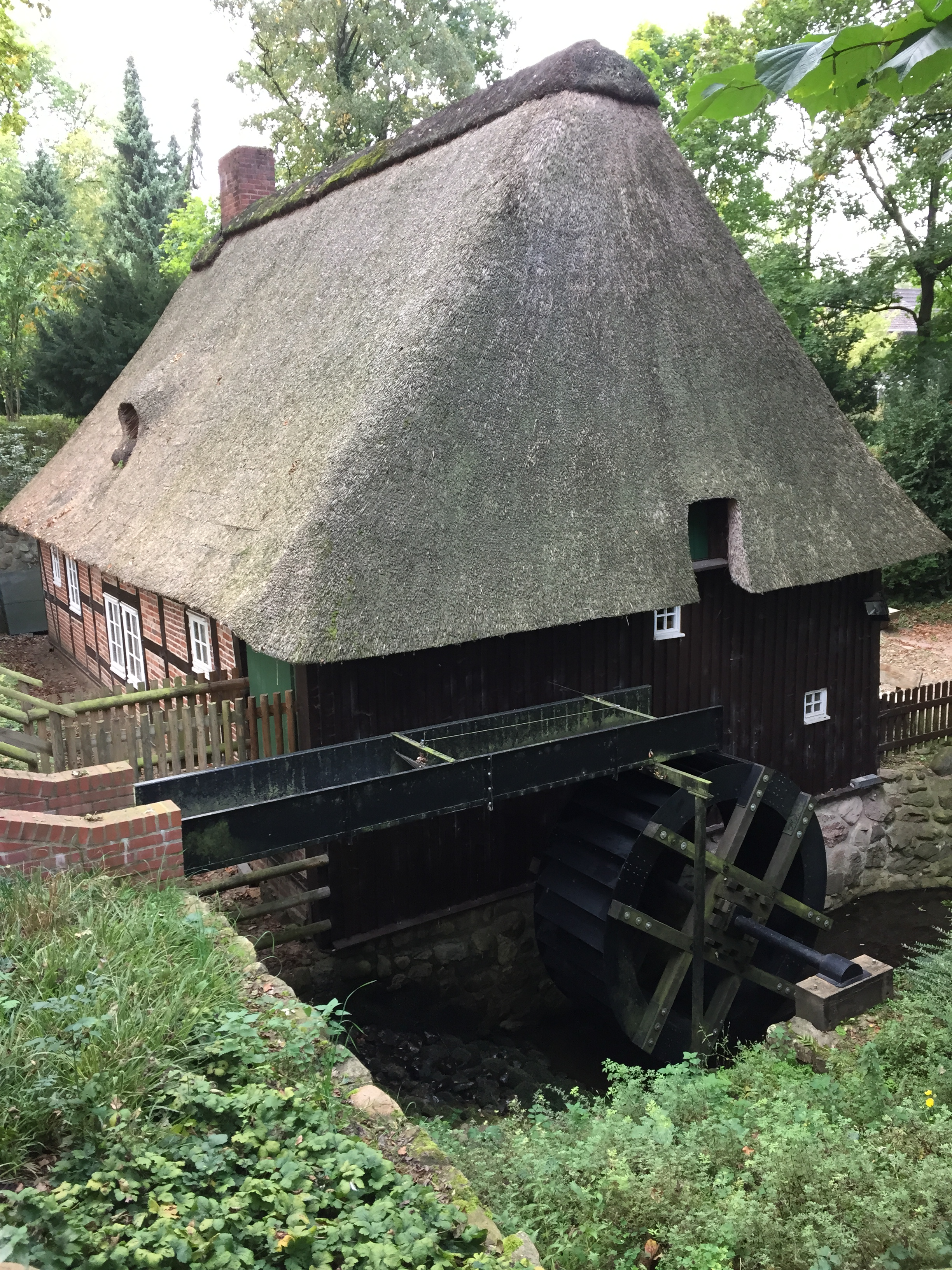 Blick vom Mühlendamm